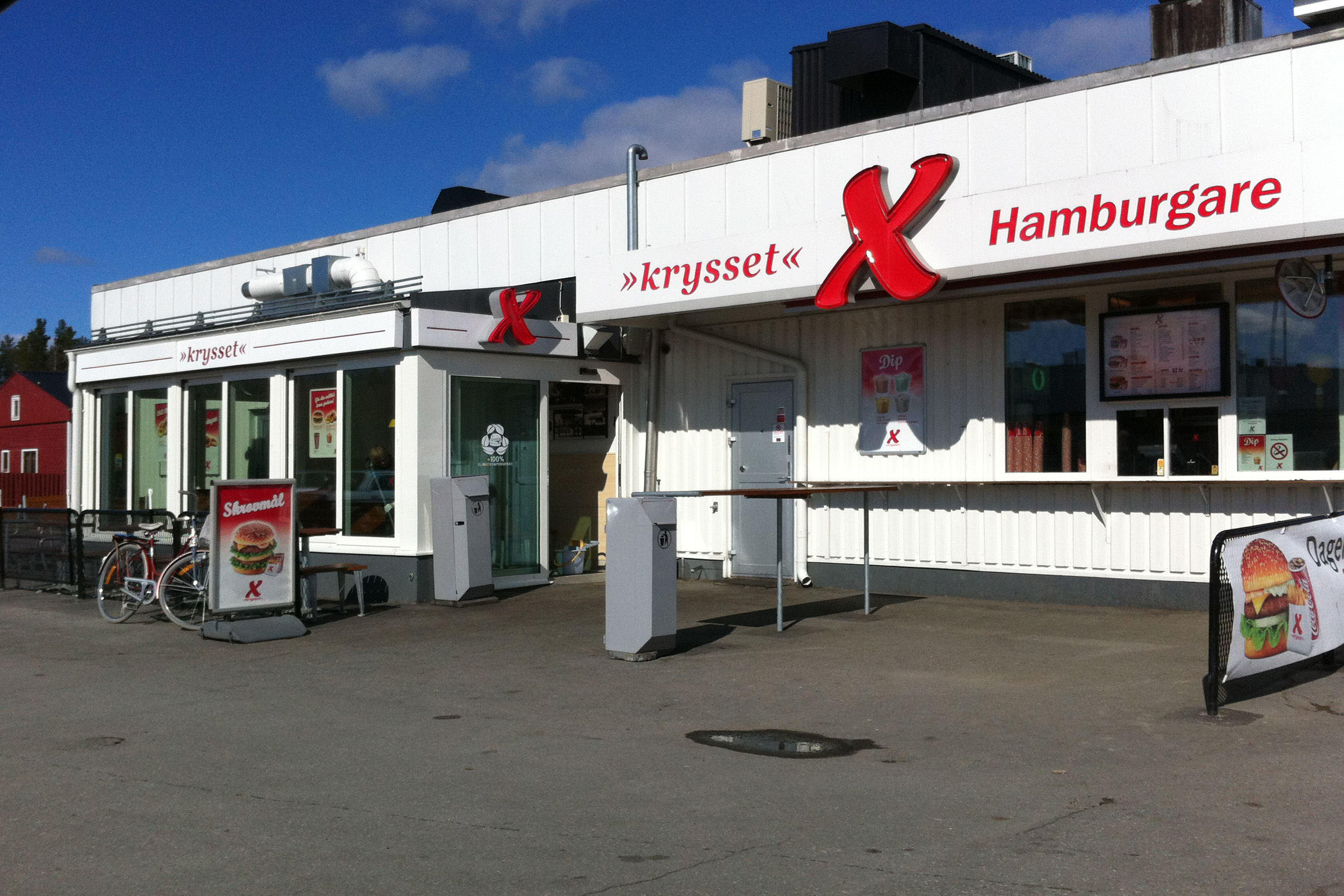 Krysset, den ursprungliga Maxrestaurangen. Denna i Skellefteå.